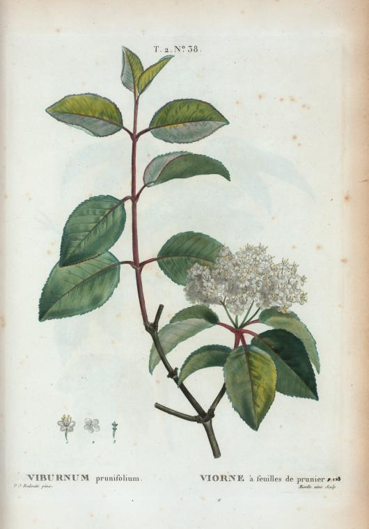 Viburnum prunifolium = Viorne à feuilles de prunier.